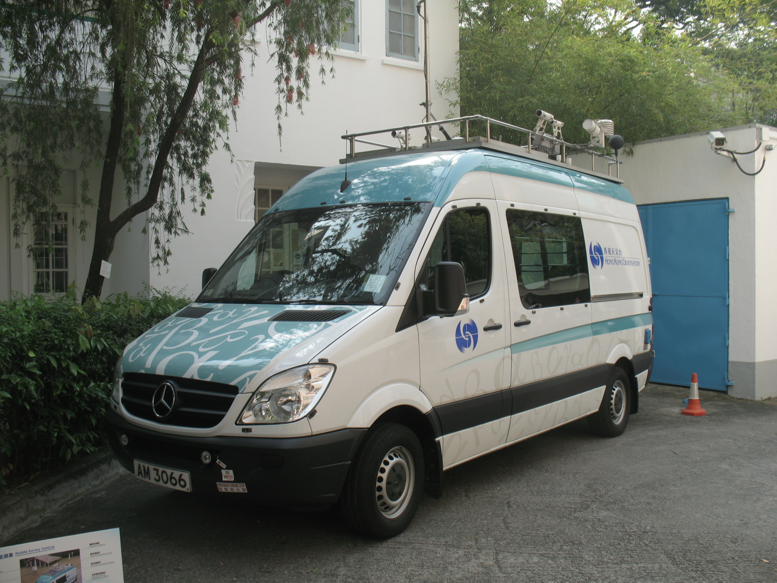 中文（香港）: 香港天文台的流動巡測車，主要功能是集氣象監測、輻射監測、風向監測功能於一身的「流動氣象台」，型號是平治凌特324型，政府車輛牌號是AM3066。